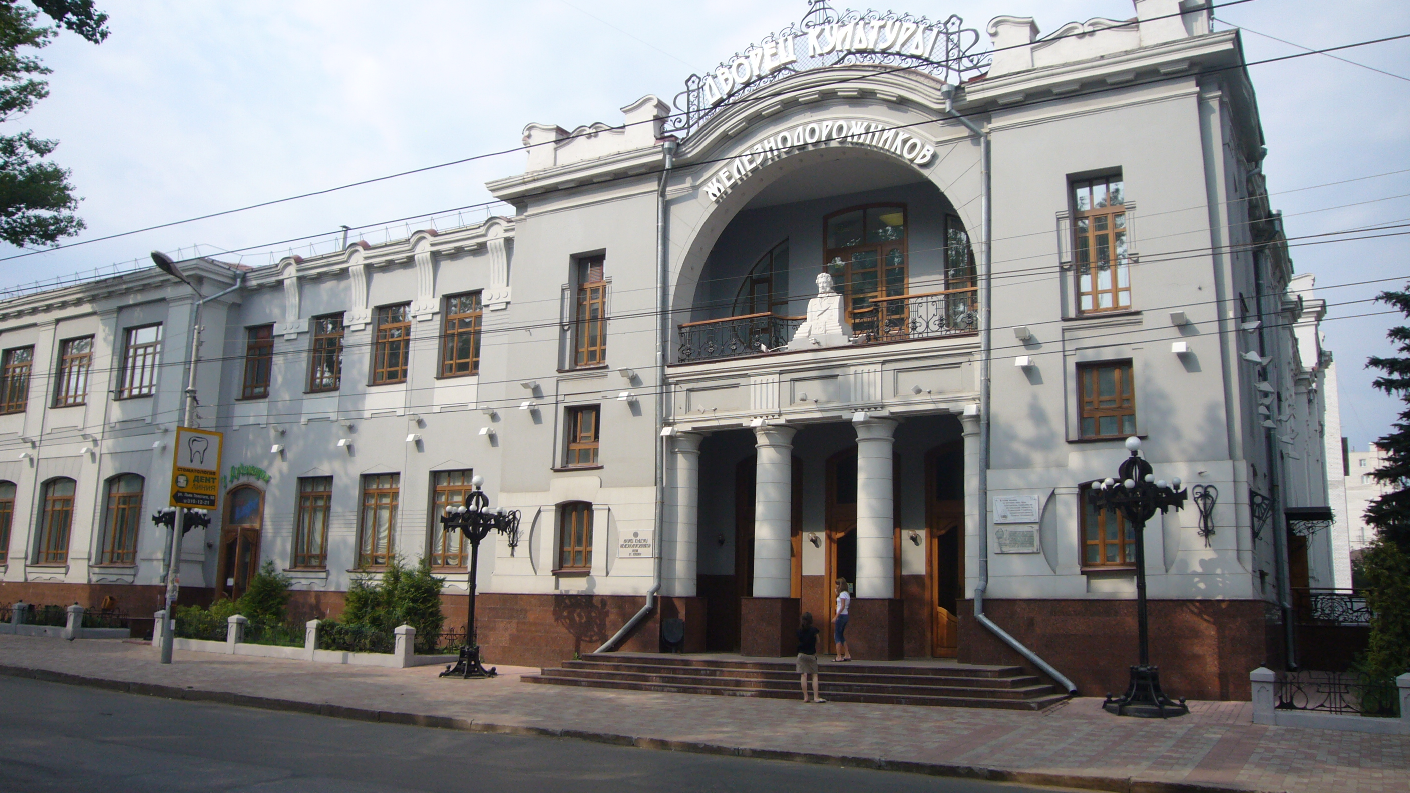 Дворец культуры железнодорожников им. А. С. Пушкина